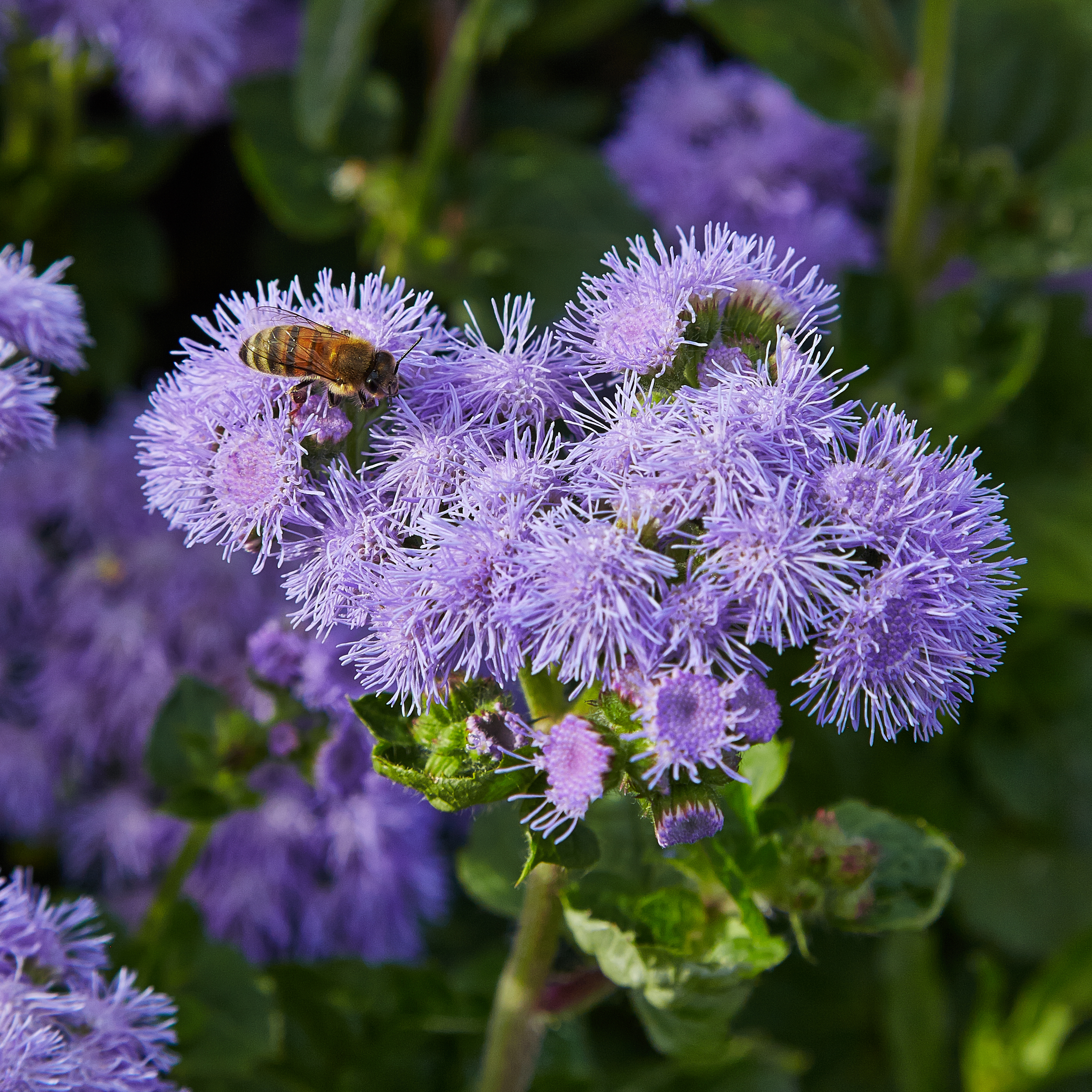 Ageratum houstonianum indentifierad med hjälp av befintlig skylt i Bergianska trädgården.